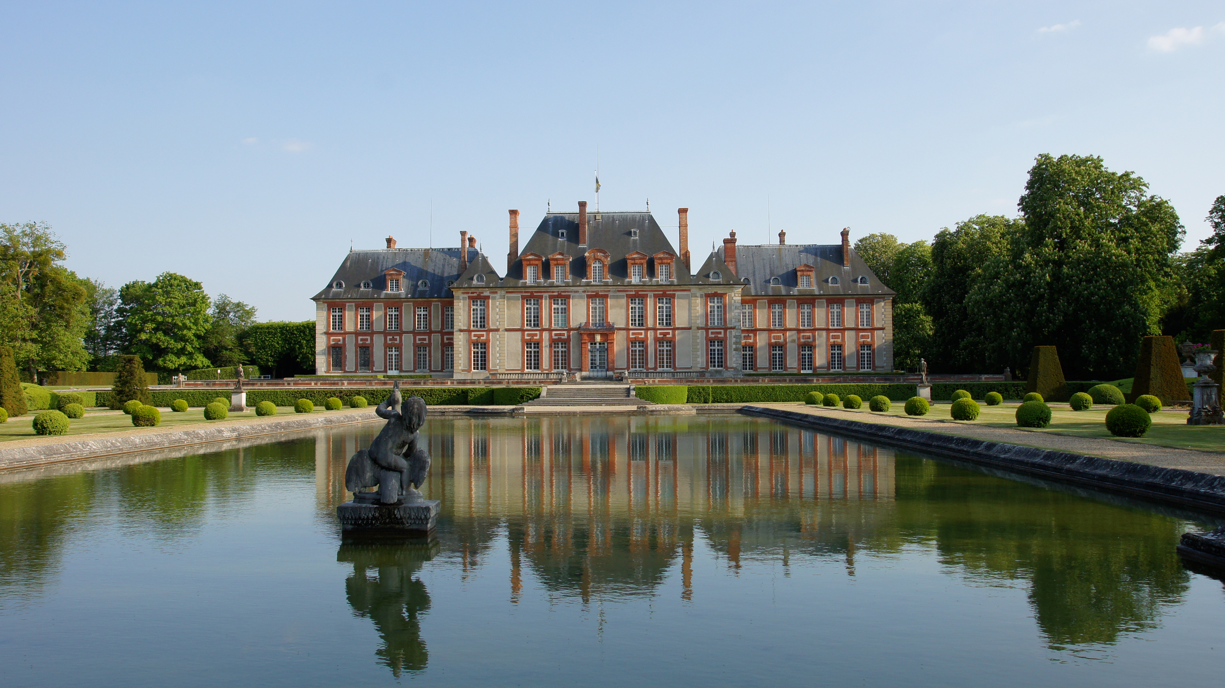 Château côté nord et miroir d'eau Château de Breteuil